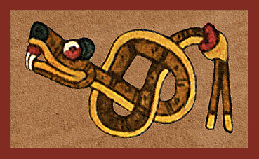 Symbole Coatl du Codex Borgia (fac-similé). Foundation for the Advancement of Mesoamercan Studies, Inc. (FAMSI).